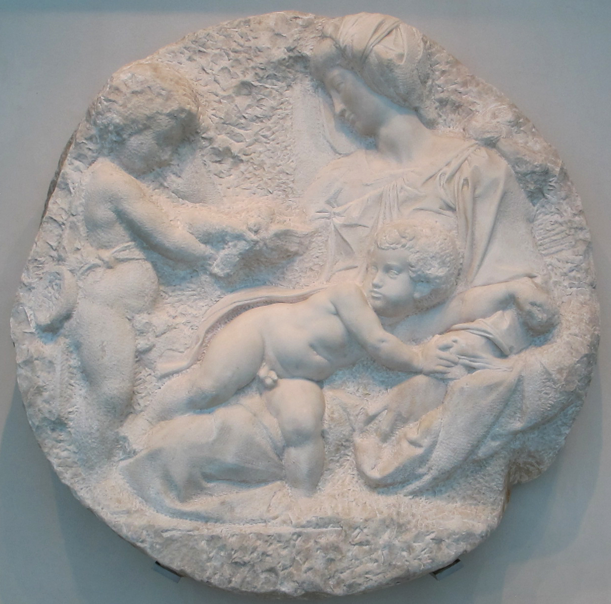 Michelangelo, tondo taddei, 1504-05 ca.